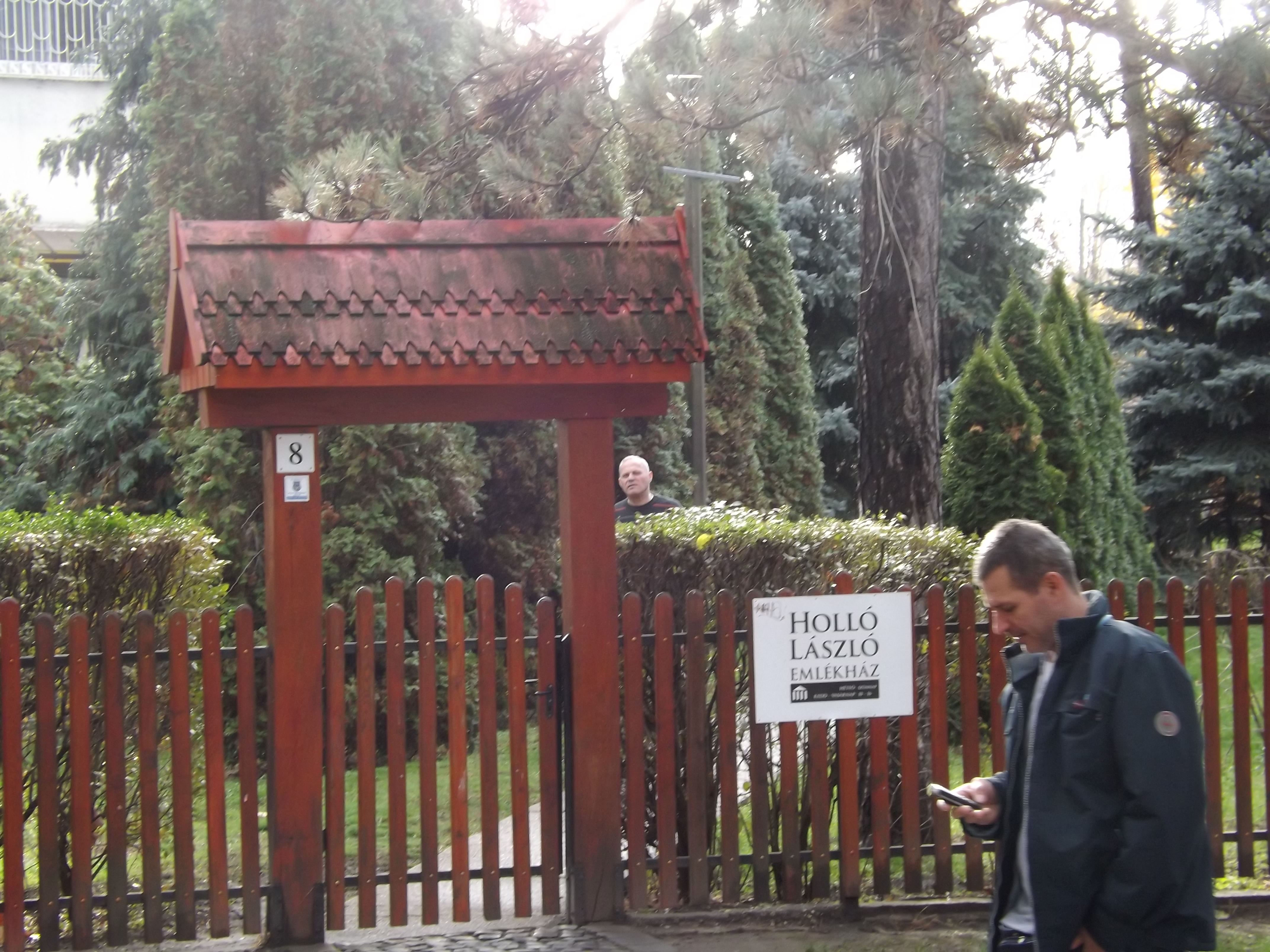 Debrecen, Holló László emlékház bejárata